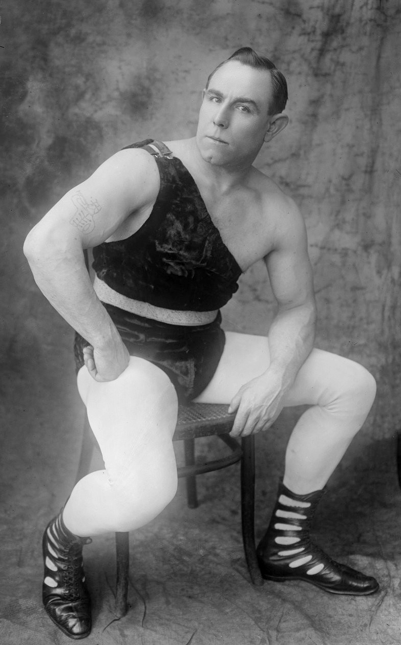 [Portrait de Louis] Vasseur, athlète : [photographie de presse] / [Agence Rol]